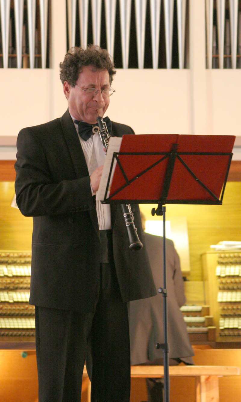 Музыкант Владимир Скляренкона концерте в Большом зале Саратовской консерватории